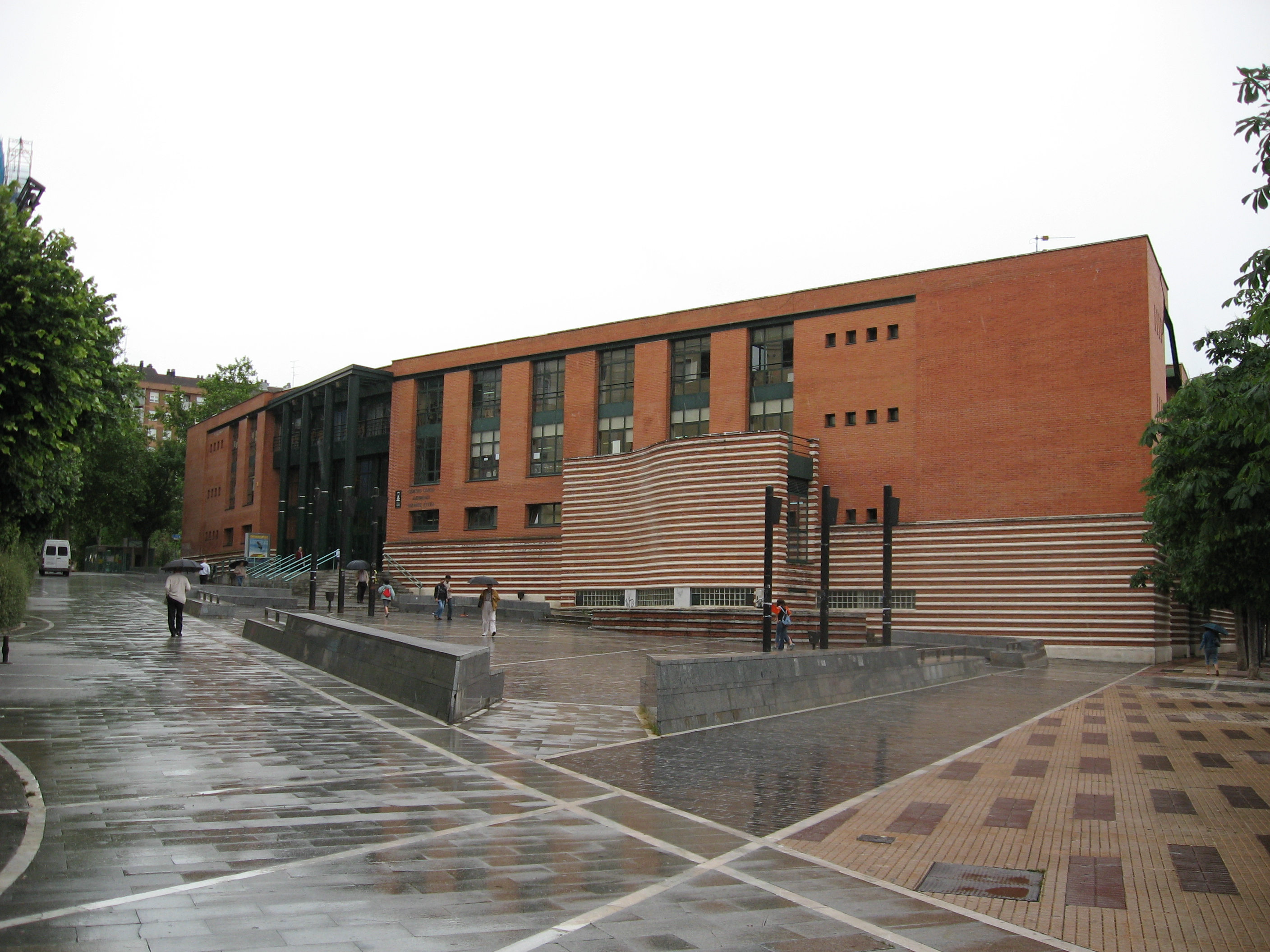 Desc: Centro cívico de Judizmendi